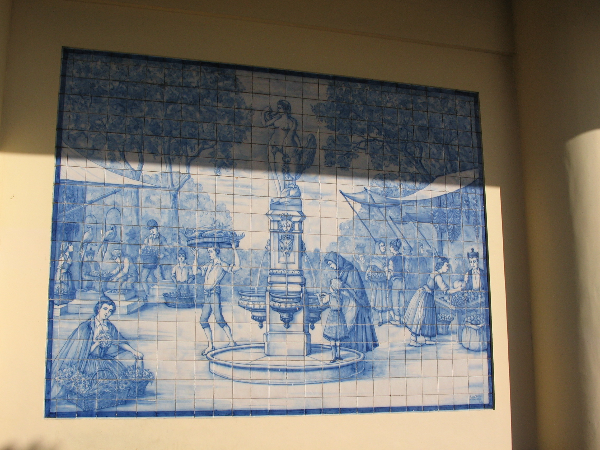 A Dolgozók Piaca (Mercado dos Lavrodores) azulejo csempeképe a Lédát és a hattyút ábrázoló díszkúttal (Funchal, Madeira)